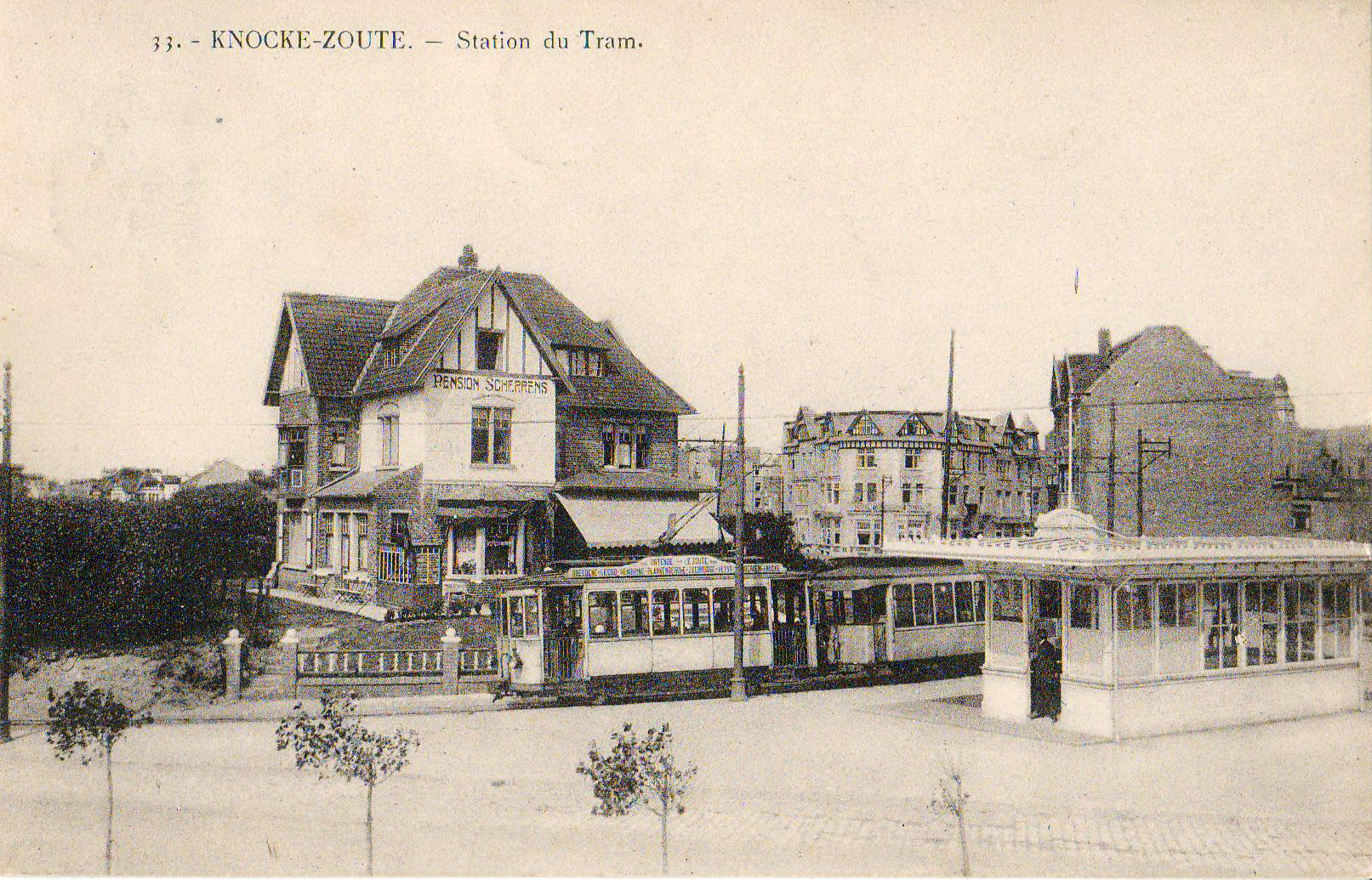 Carte postale ancienne éditée par Henri Georges, éditeur à Bruxelles N°33KNOCKE-ZOUTE - Station du Tram